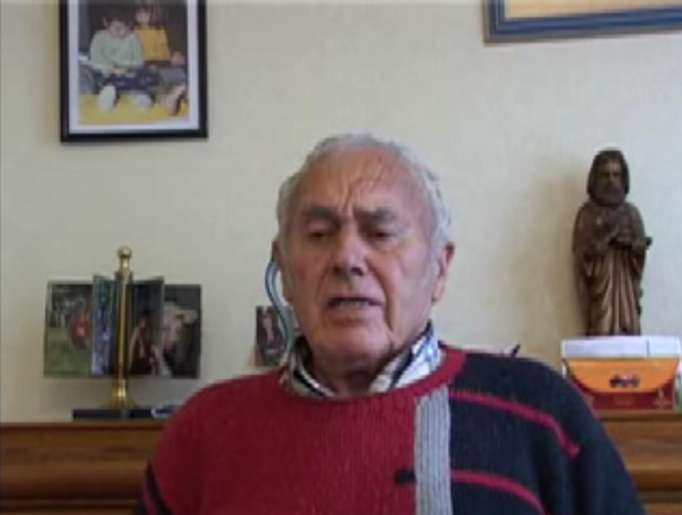 Yann-Vadezour Lagadeg er gêr o kanañ.